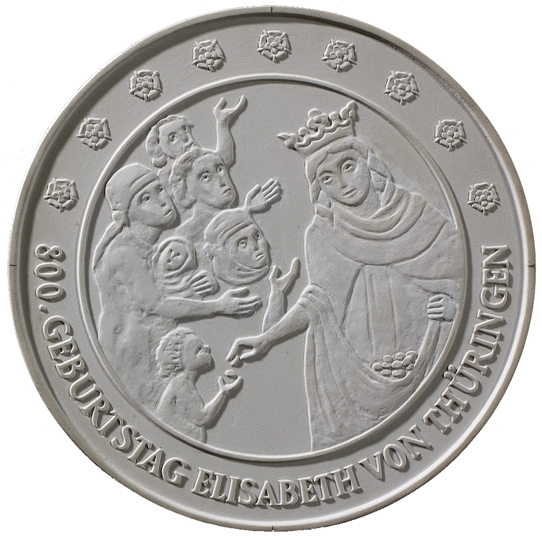 Evelyn Hartnick. Gipsmodell für Gedenkmünze Hildegard von Bingen im Rahmen des Künstlerwetbewerbes am 28./29.8.1997, hier: Adlerrückseite